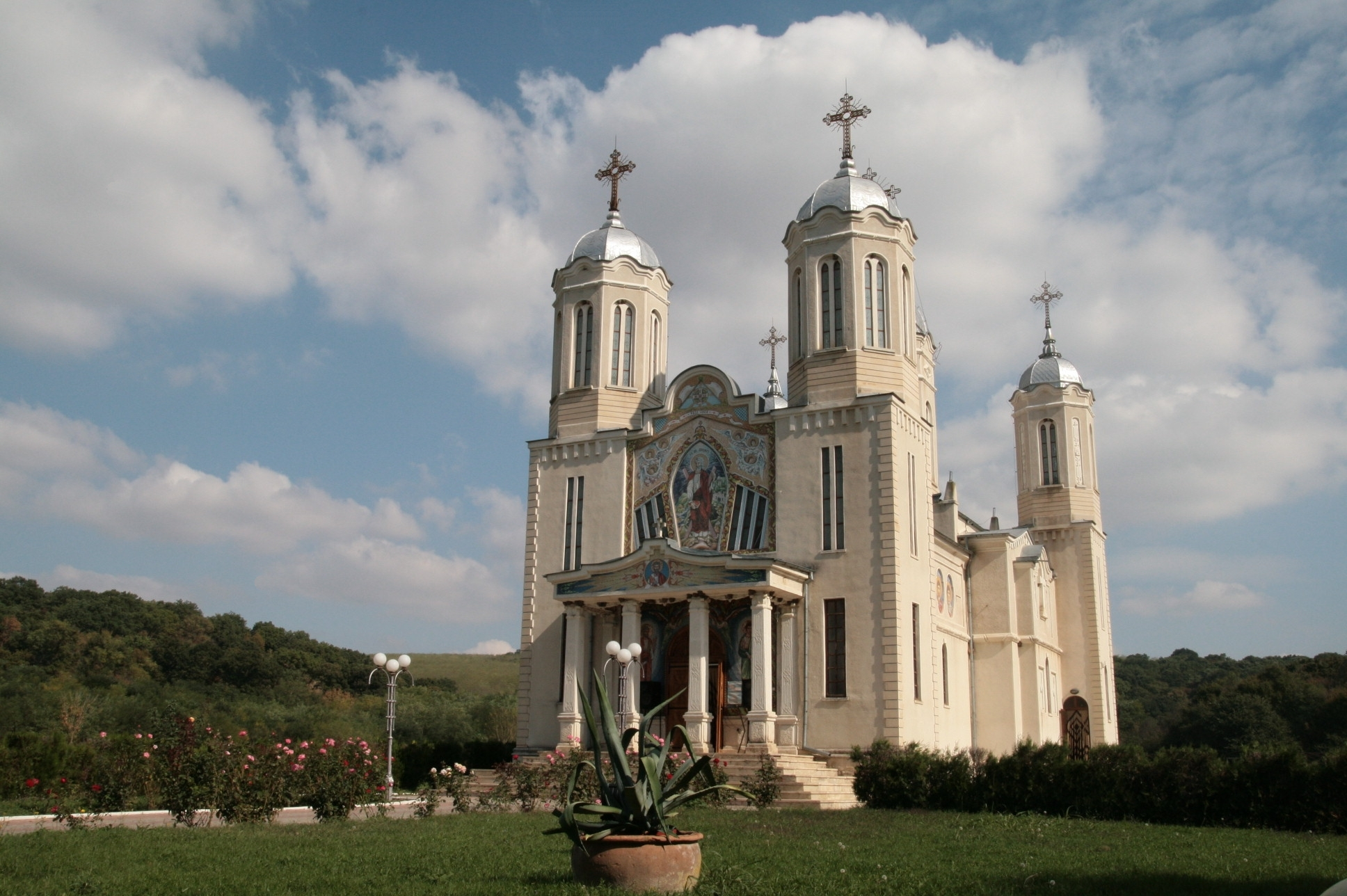 Biserica Sf.Andrei , jud. Constanta